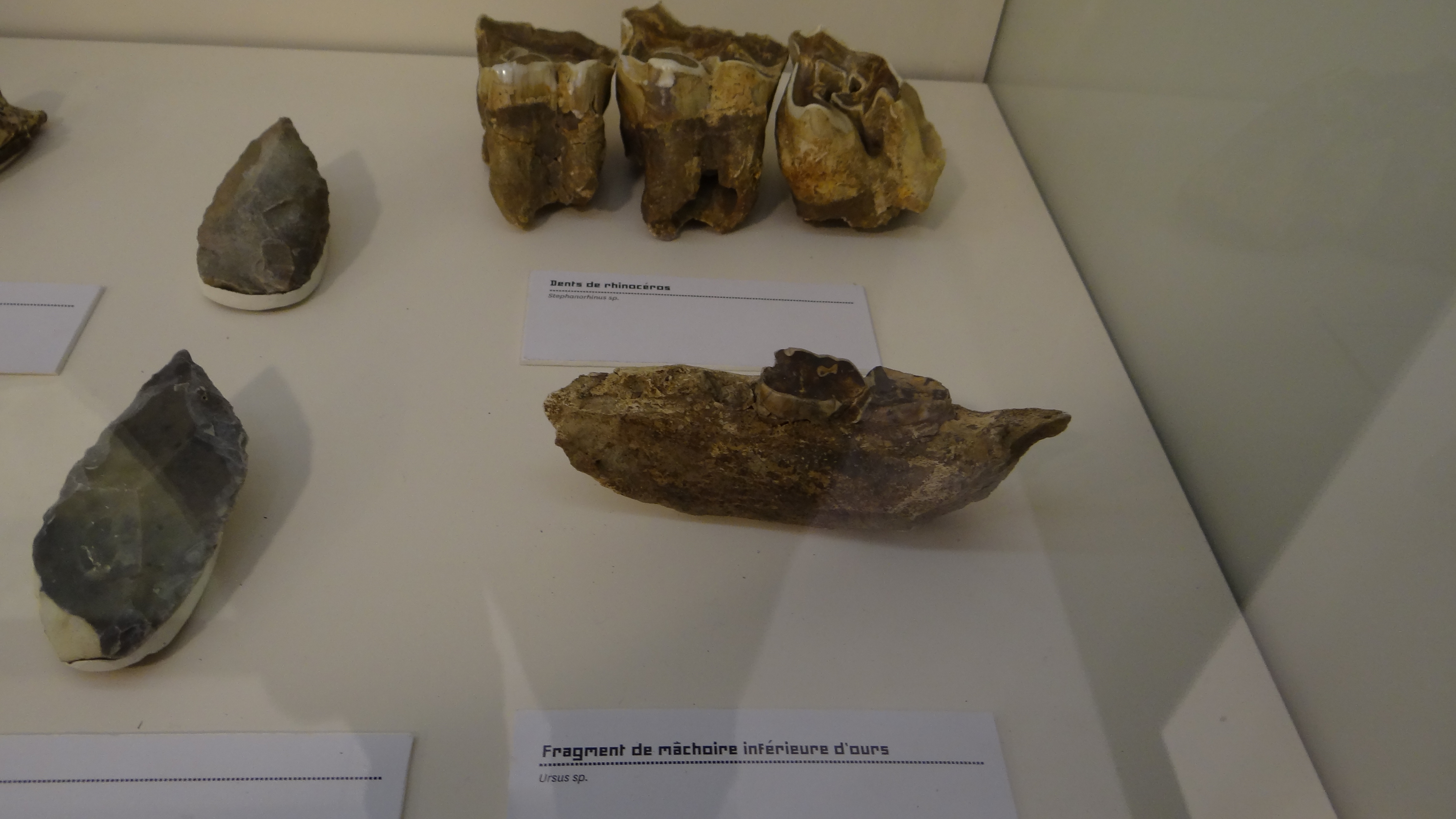 Archeos - Biache-Saint-Vaast - Rhinoceros et Ours